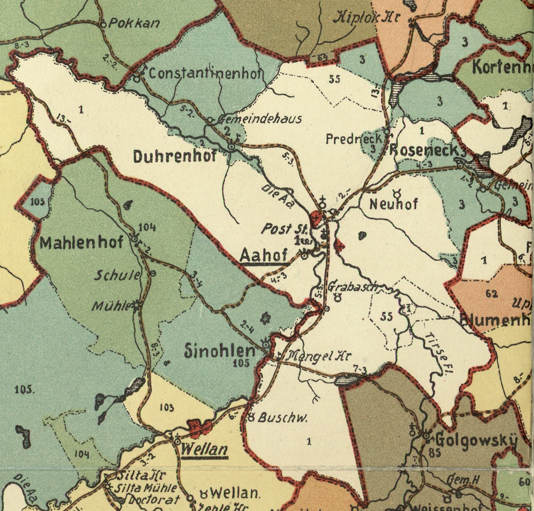 Lejasciemsi kihelkonna mõisad 1904. aasta kaardil.